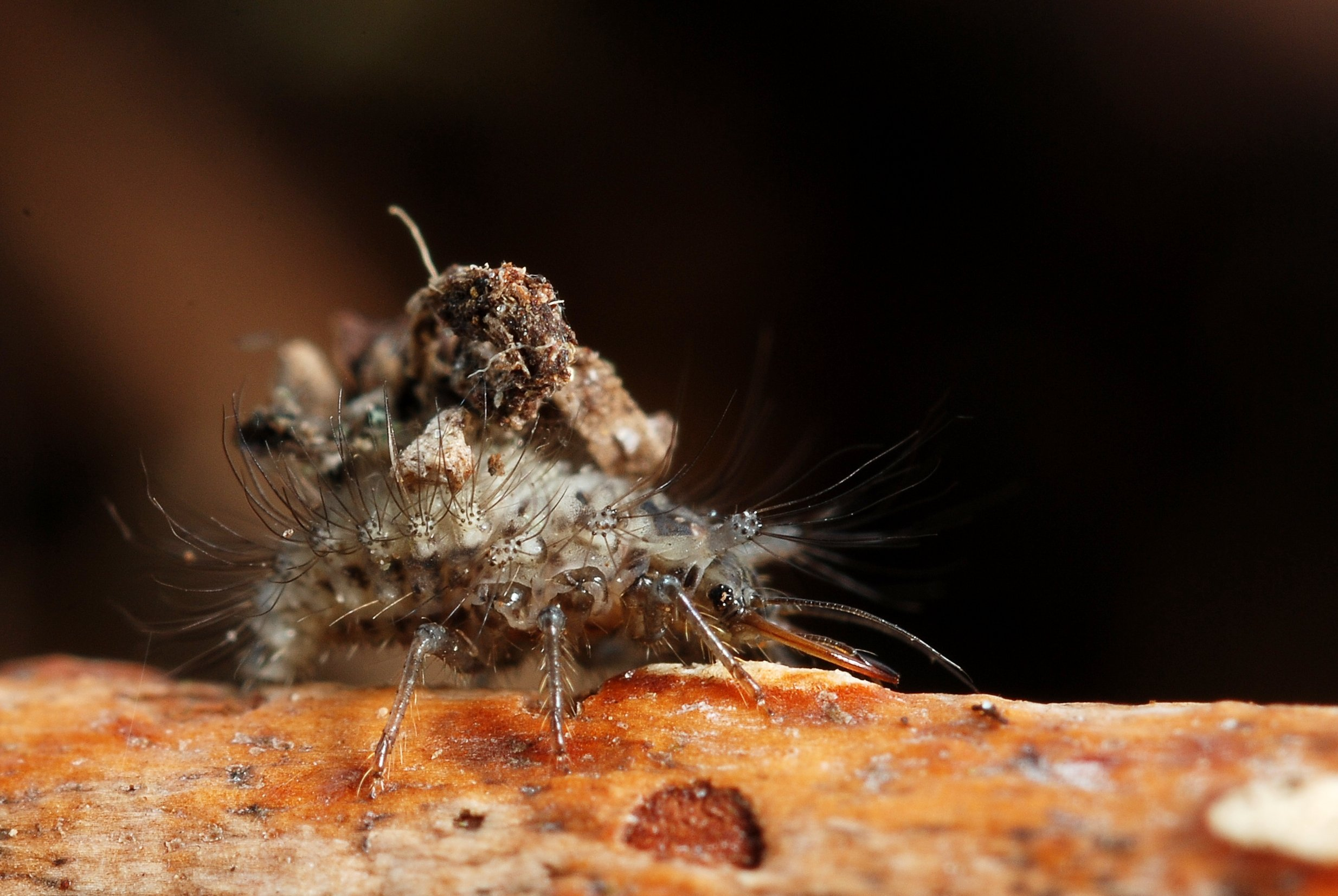 Dichochrysa sp. larva